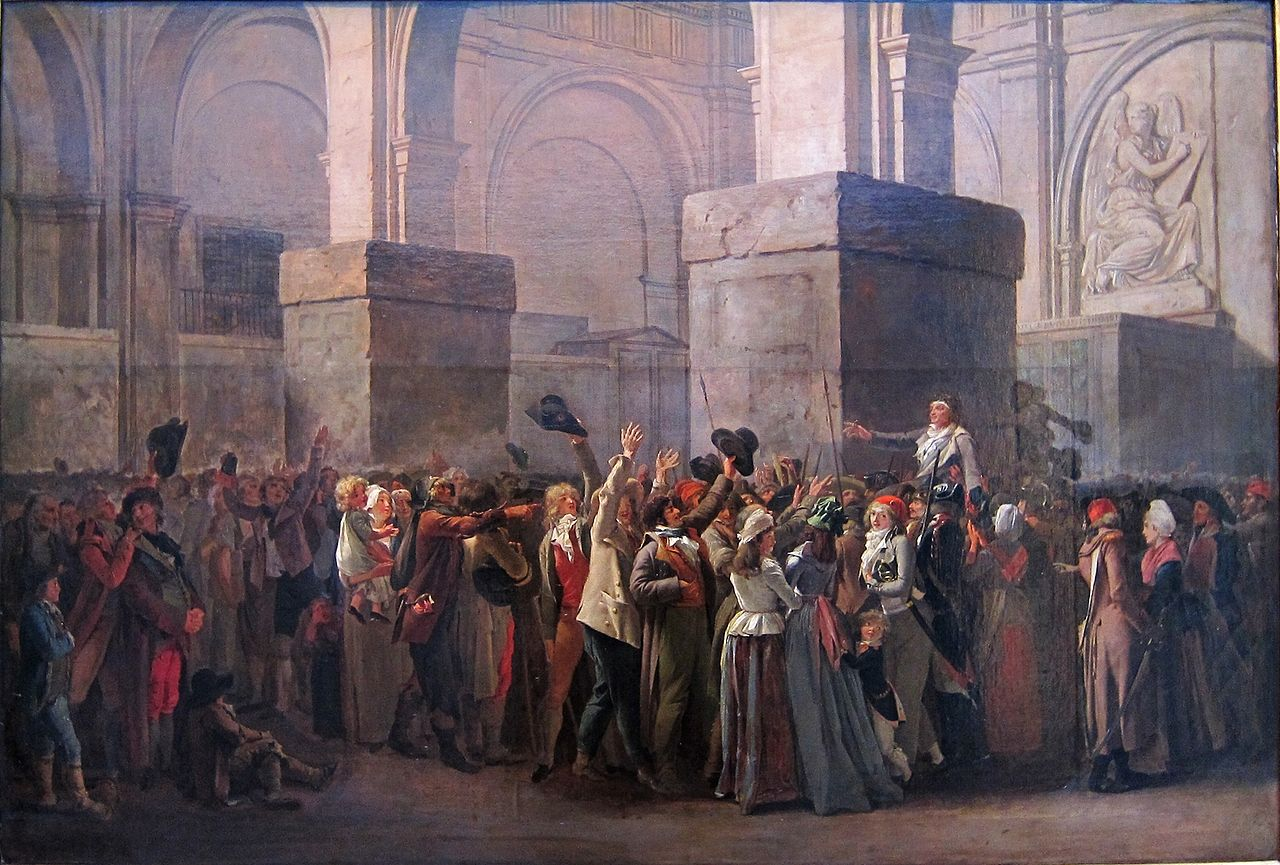 “Триумфот на Мара”. (Мара е славен од народот откако е ослободен од Револуционерниот трибунал на 24 април 1793). Слика од Луј-Леополд Боаји (1761-1845). Масло на платно, 81 × 121 cm. Лил, Musée des Beaux-Arts.